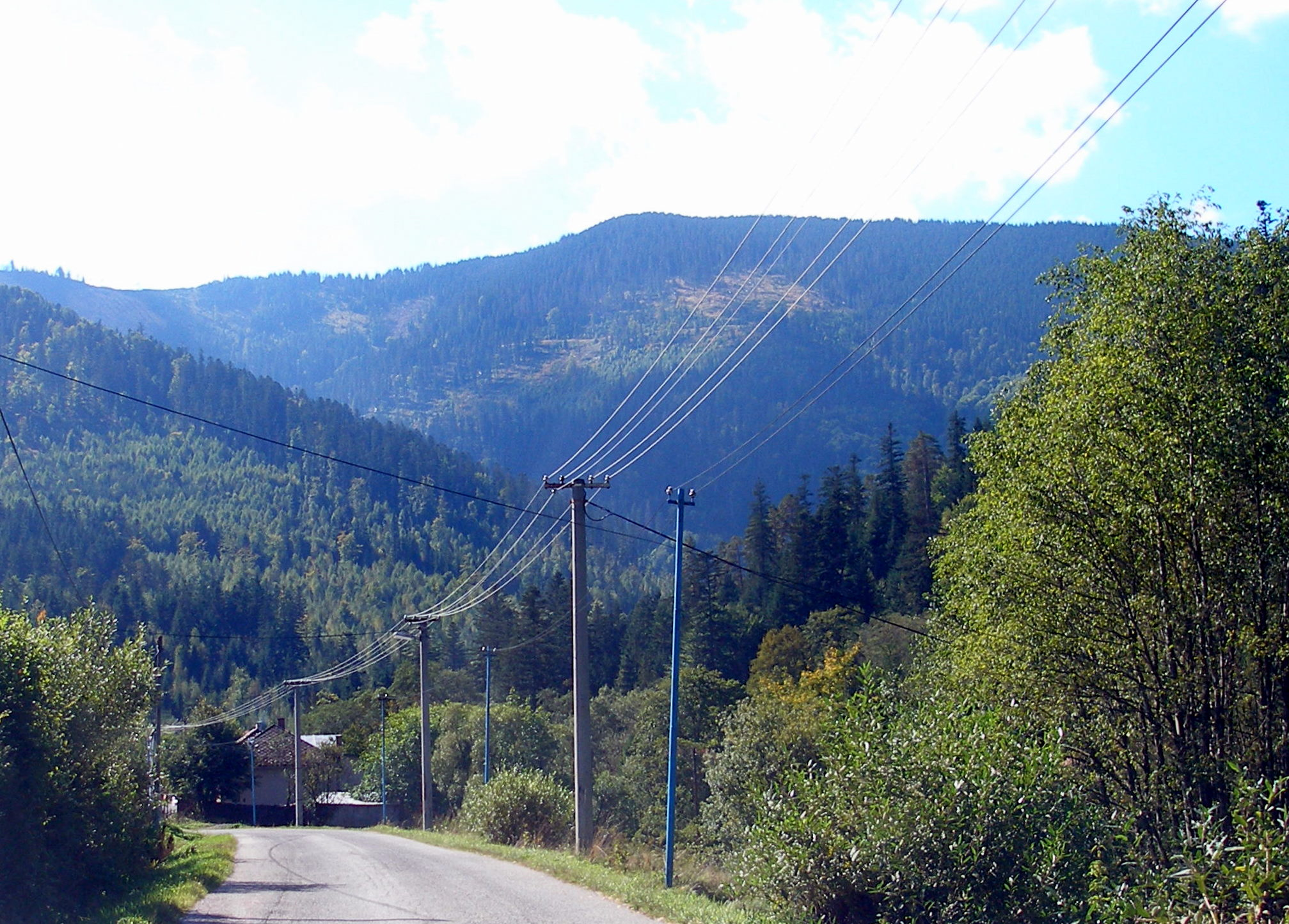 Spišská obec Stará Voda okres Gelnica